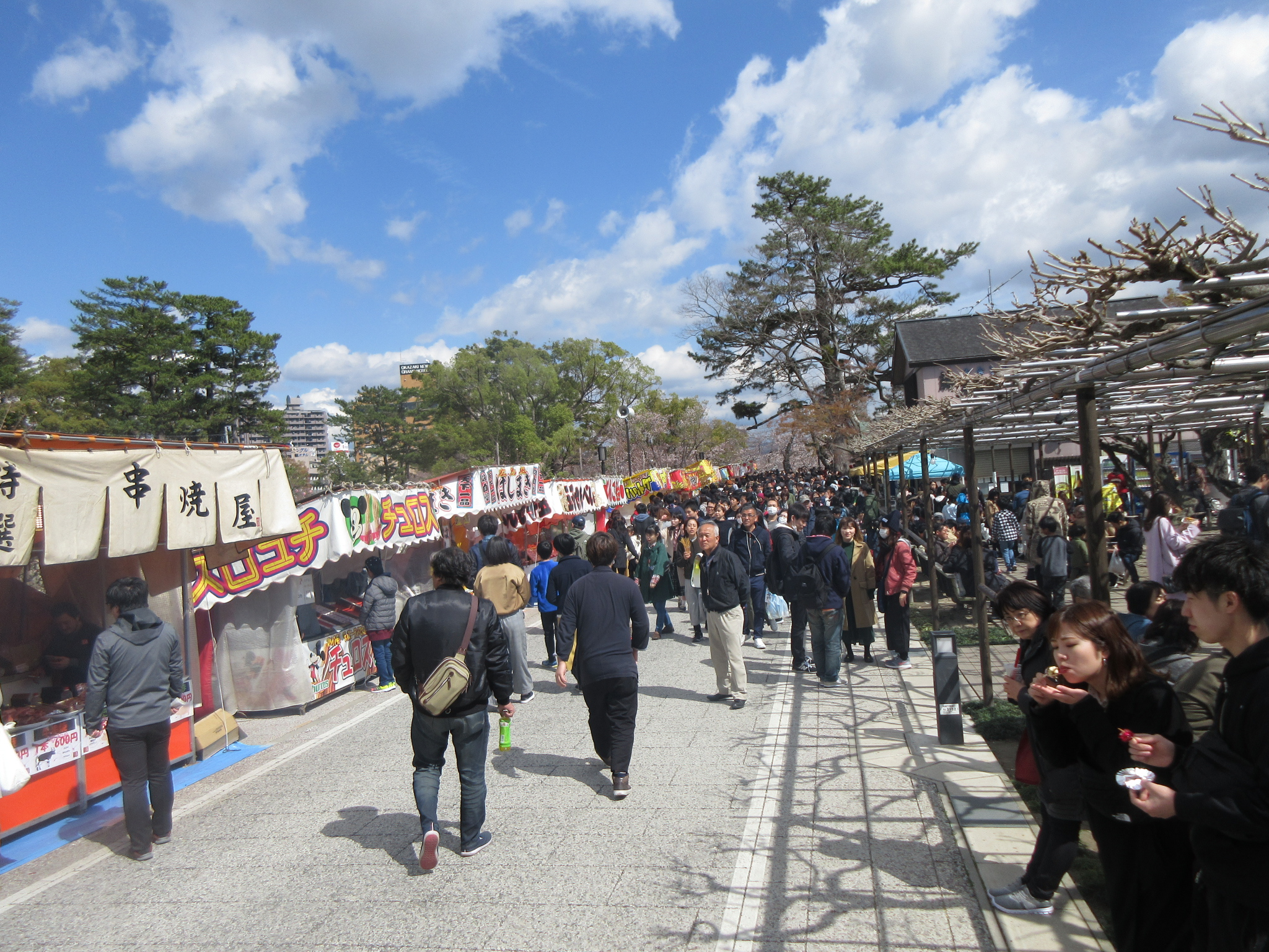 岡崎公園内を通る竹千代通り